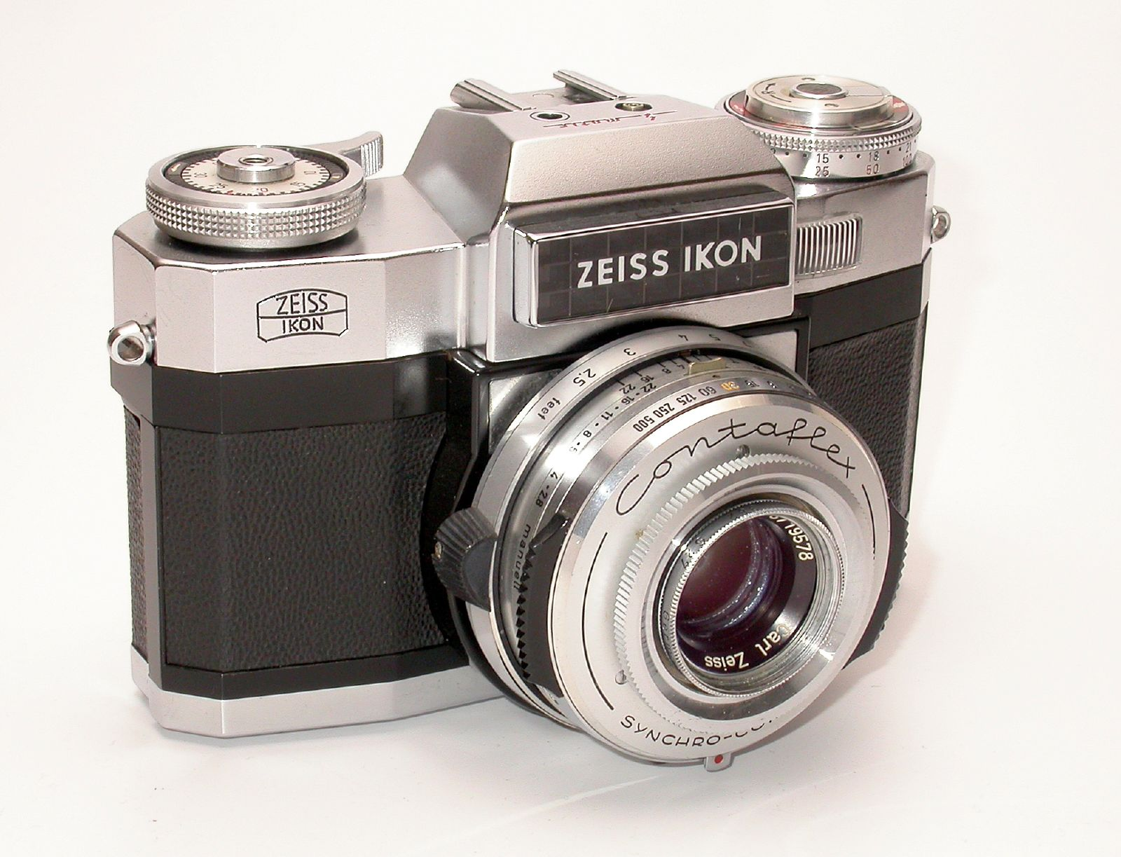 ZI Contaflex